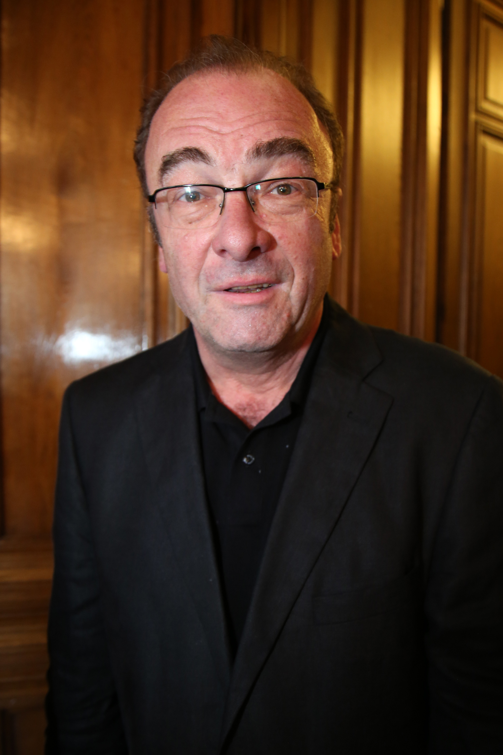 Menasse-Robert-5708